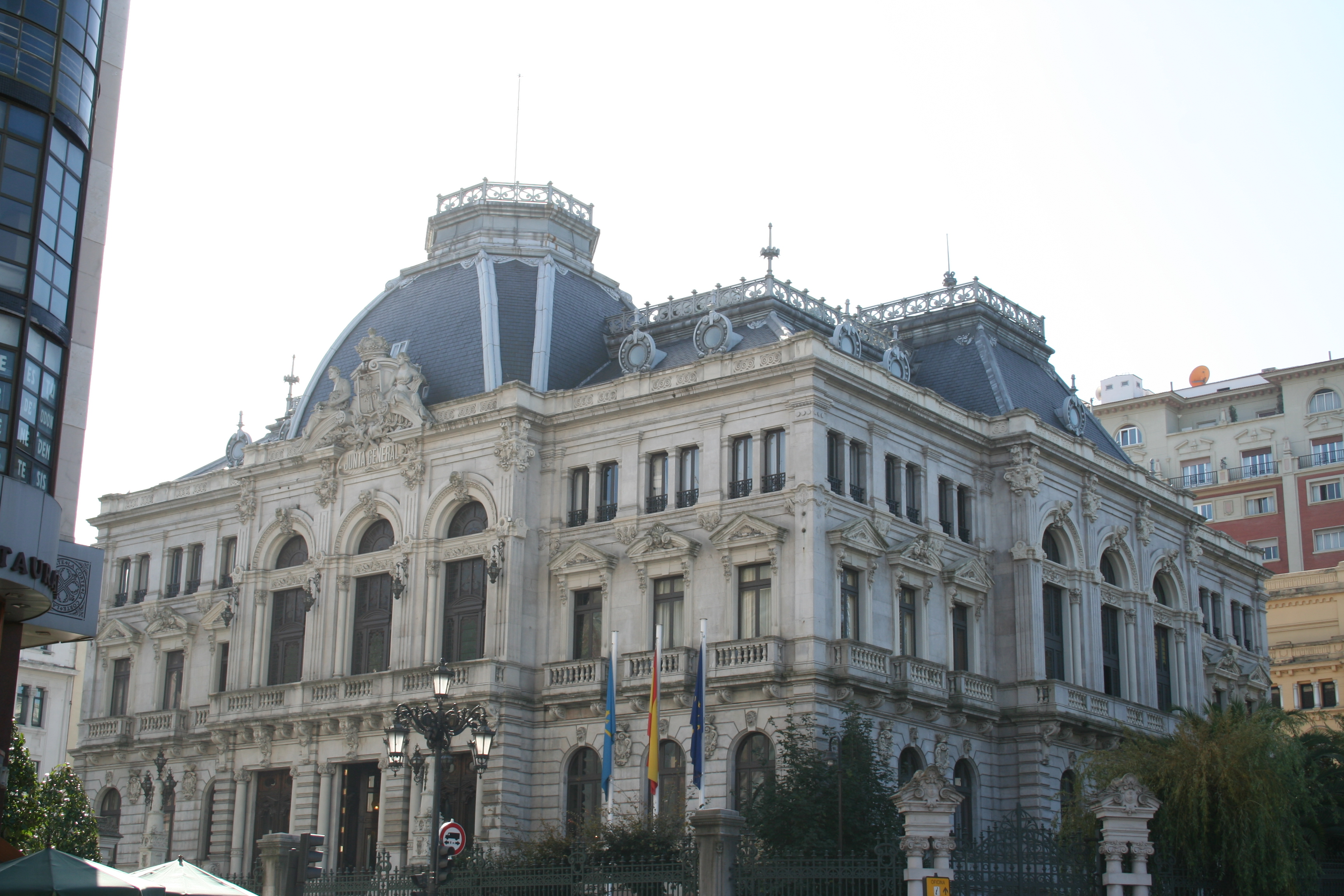 Junta general de Asturias